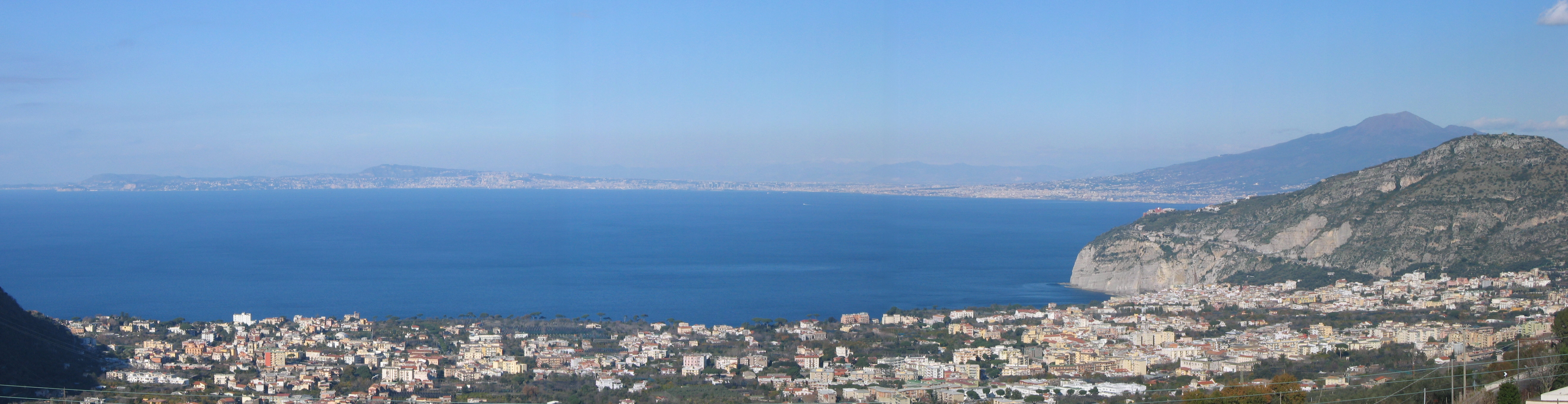 I Colli di Fontanelle sono una frazione di Sant'Agnello, in provincia di Napoli, ubicata sulle colline della Penisola Sorrentina, a poco più di 2 km in linea d'aria dal centro cittadino. La foto ritrae il panorama che è possibile ammirare dai Colli di Fontanelle guardando verso nord, sul Golfo di Napoli. A destra, sullo sfondo, si scorge il Vesuvio.